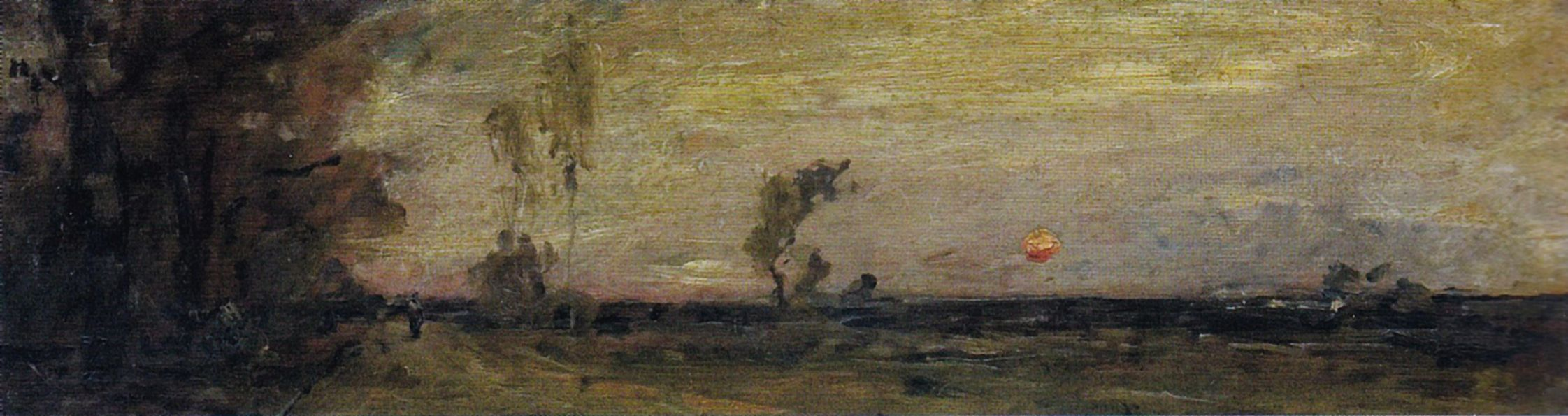 Peisaj, ulei pe lemn - Galeria de Artă Românească a Muzeului Național de Artă al României.